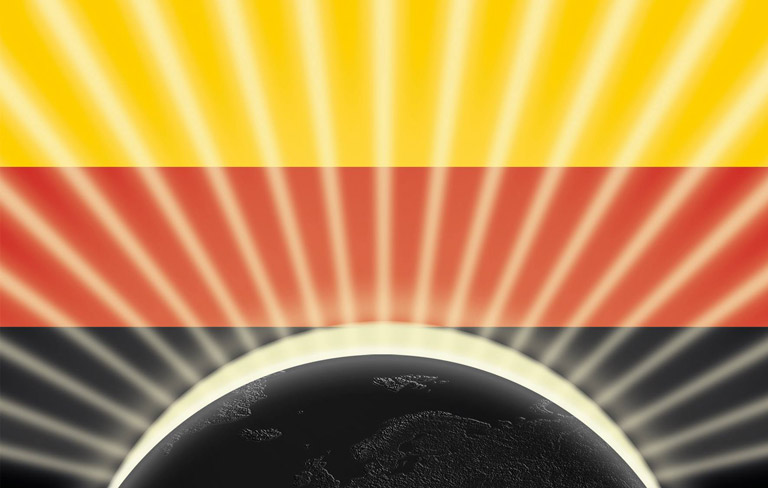 Flagge des Fantasiestaats Koenigreich Deutschland